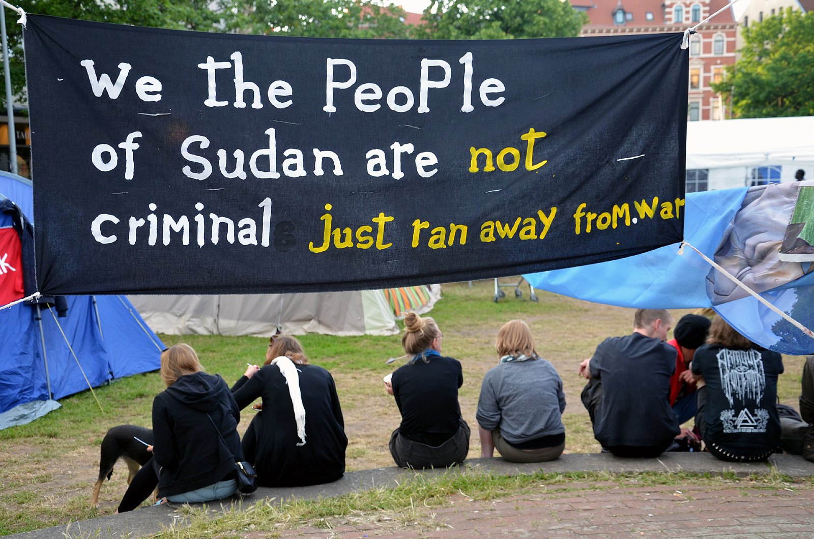 Am 24. Mai 2014 schlugen Flüchtlinge aus dem Sudan ihre Zelte auf dem Weißekreuzplatz in Hannover auf, um öffentlich sichtbar friedlich gegen ihre Abschiebung zu protestieren ...